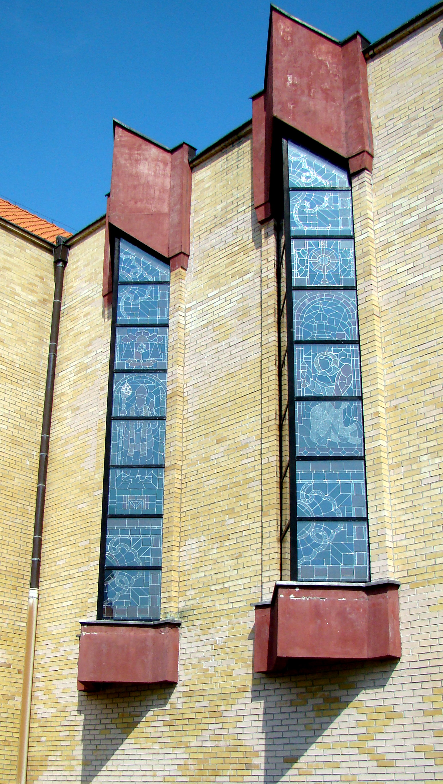 Kościół pw. św Kazimierza Królewicza w Policach (ściania zachodnio południowa), Polska